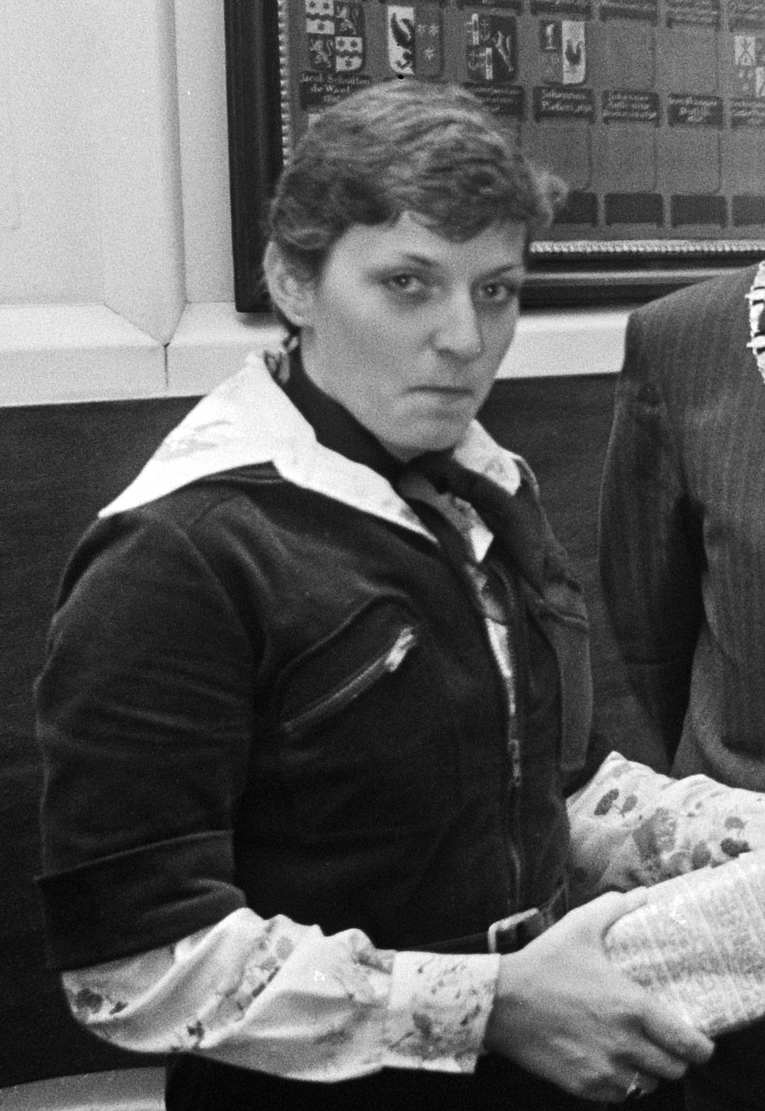 Burgemeester Samkalden ontvangt Olympische sterren; Enith Brigitha en Marijke Ruiter op stadhuis